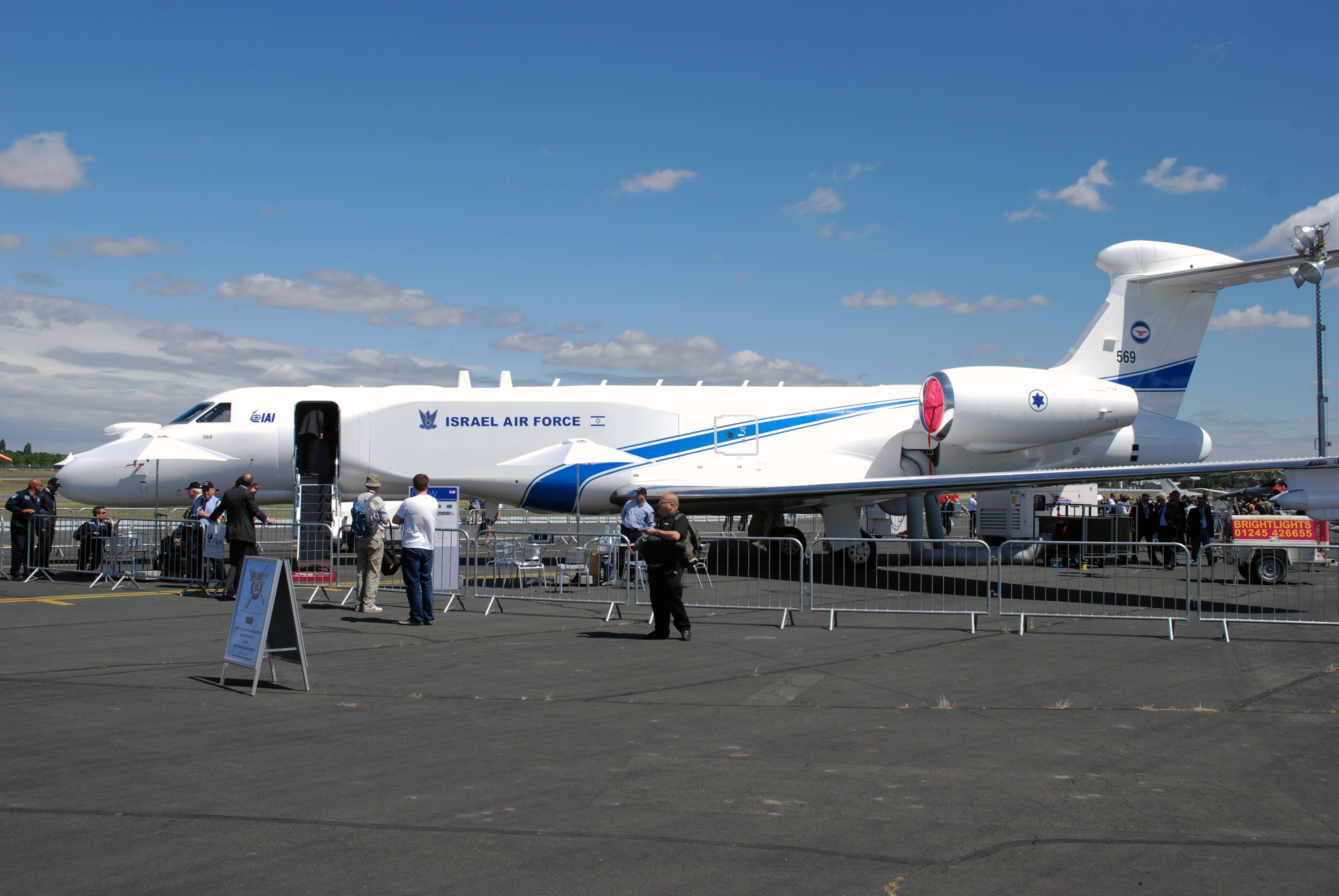 Israeli AF AEW version